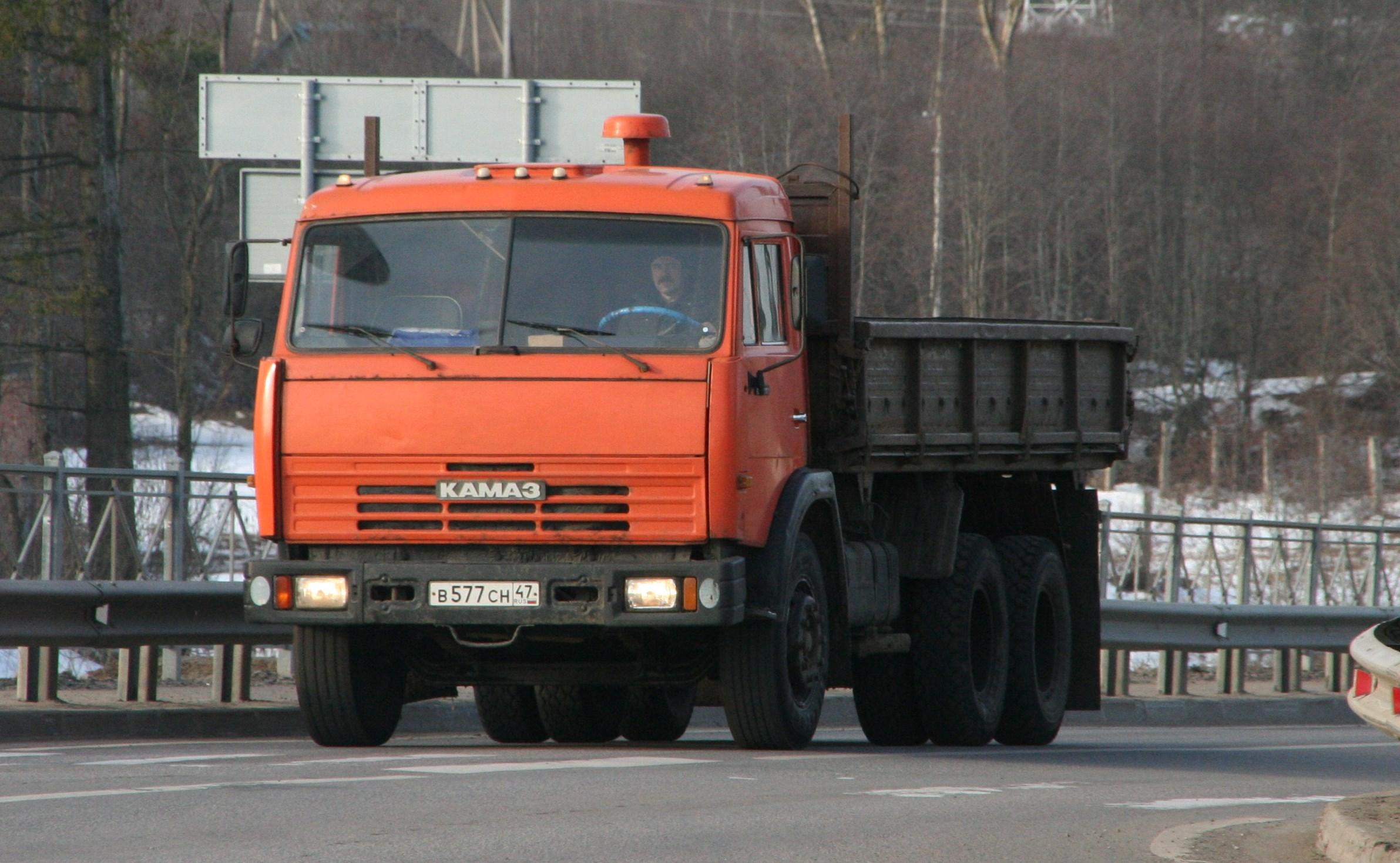 KamAZ Dreiachser als landwirtschaftlicher Kipper. Eigentum einer lokalen Farm 130km von St. Petersburg